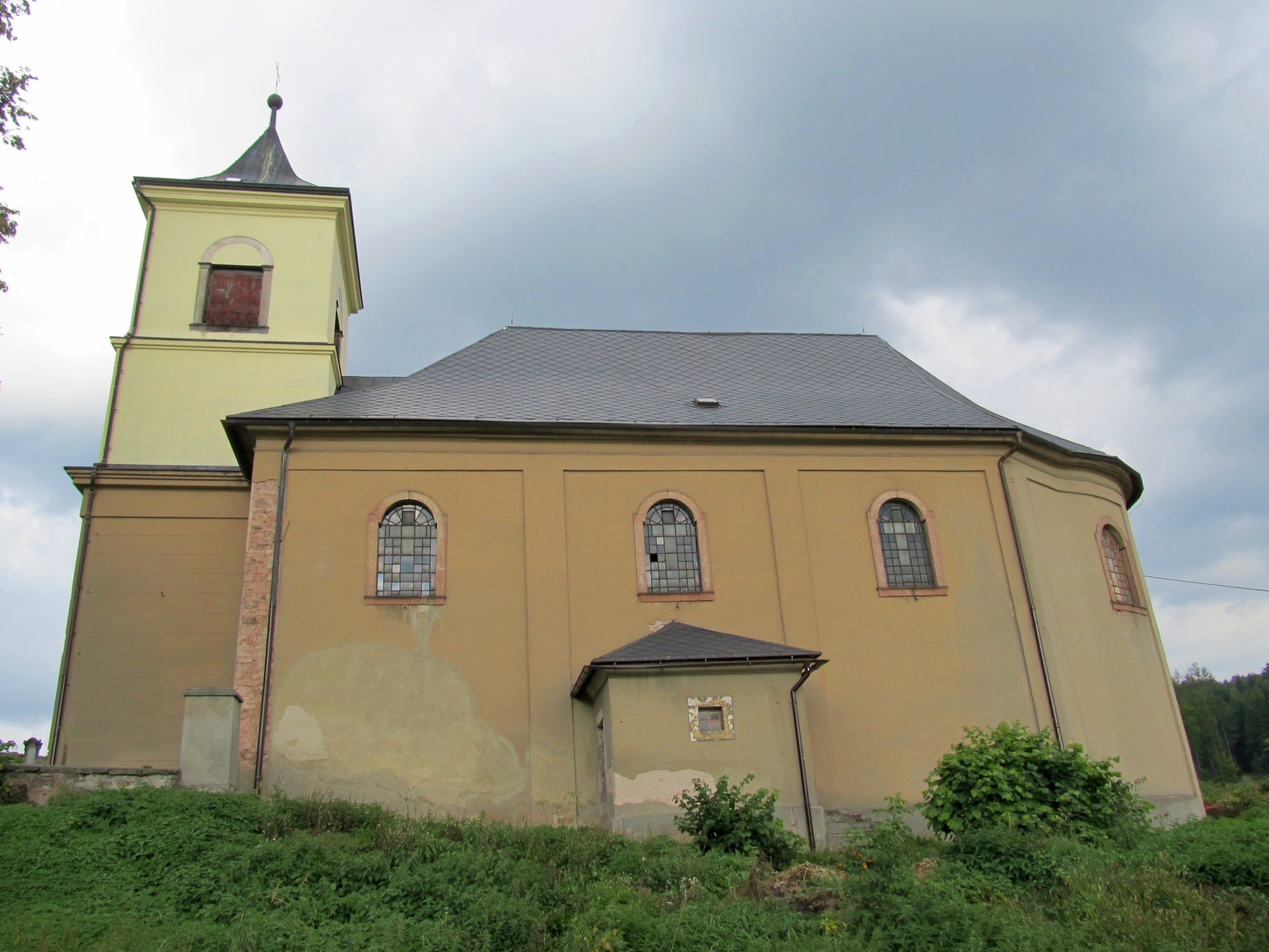 Kostel sv. Jana Křtitele (Markoušovice), Markoušovice